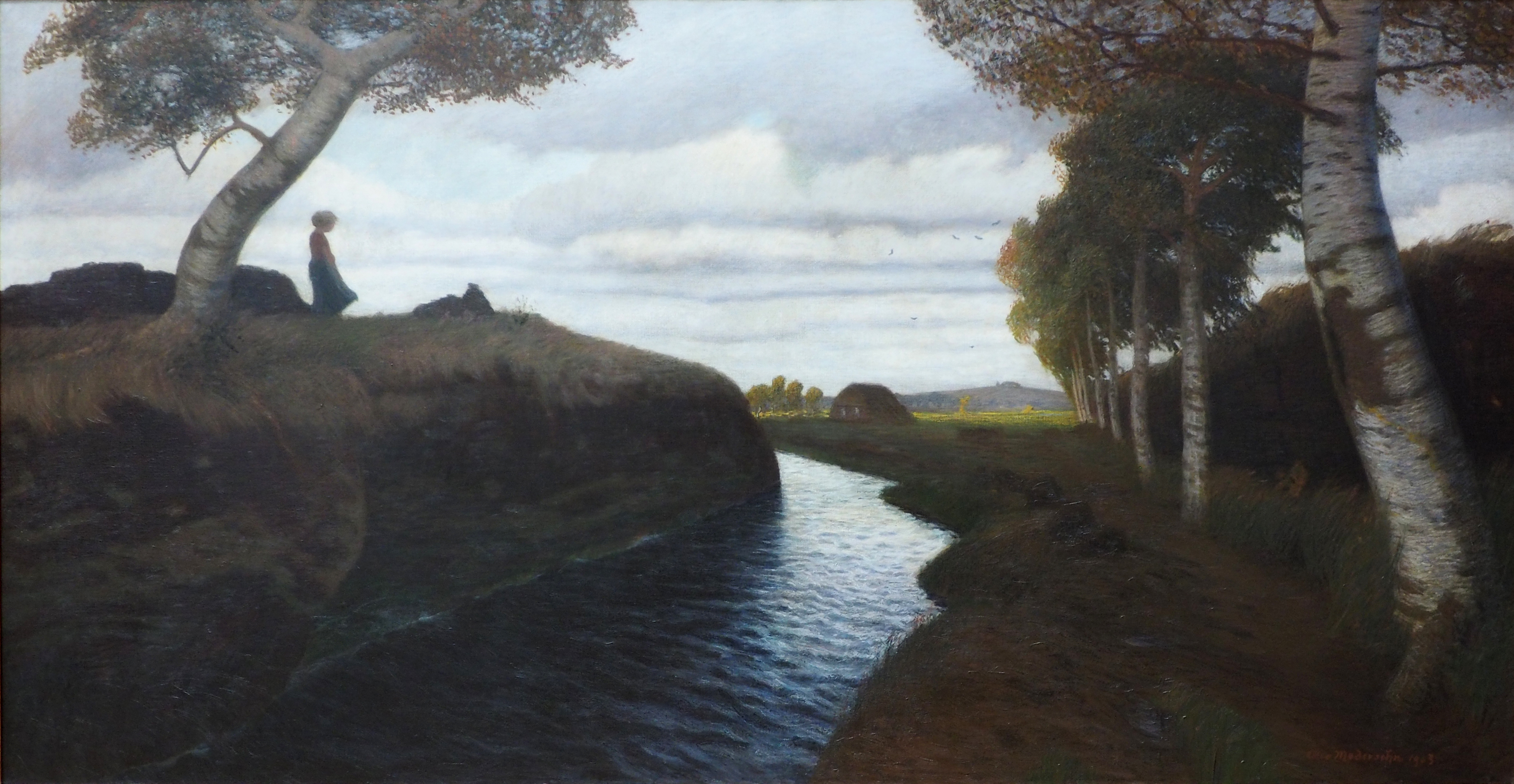 Moorlandschaft